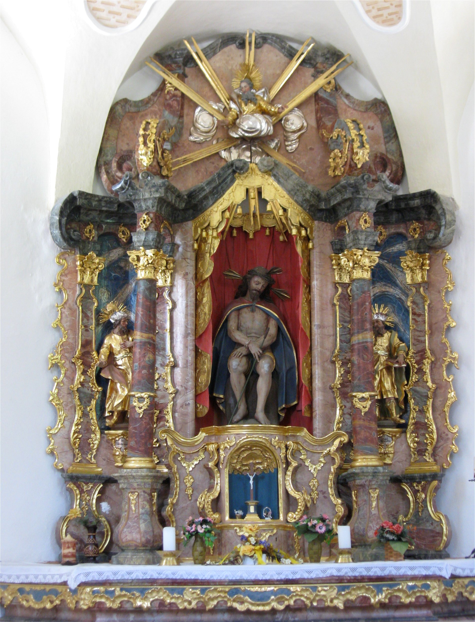 Memminger Straße 39; Katholische Herrgottsruhkapelle, pilastergegliederter Zentralbau über längsovalem Grundriss mit Dachreiter und nördlichem Vorbau, 1718; mit Ausstattung; Lindenallee, 1723. D-7-78-173-114